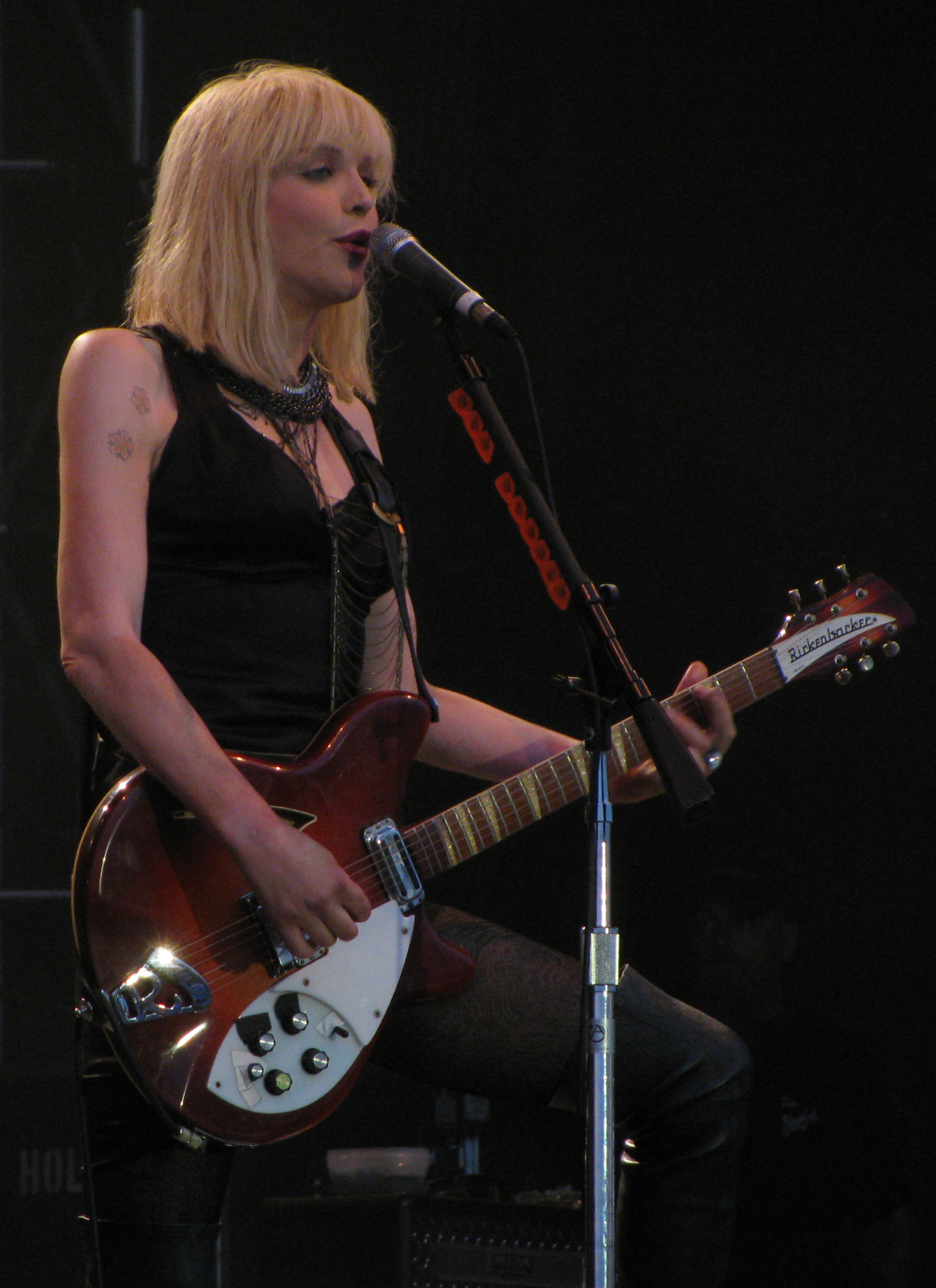 2010 Ottawa, ON